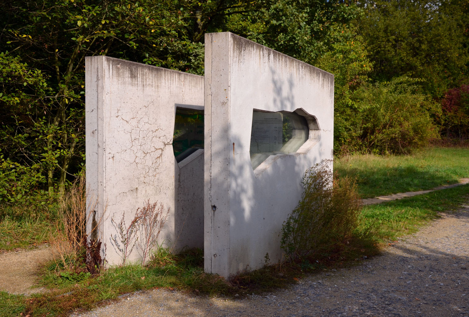 Eingang zur Heilbronner Waldheide, Betonwände mit Plan und Zeitleiste.